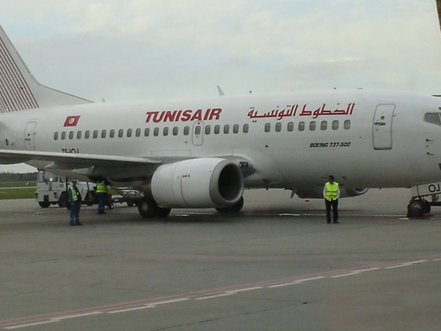 Samolot tunezyjskich linii lotniczych Tunisair na pÅ‚ycie lotniska w Katowicach-Pyrzowicach.